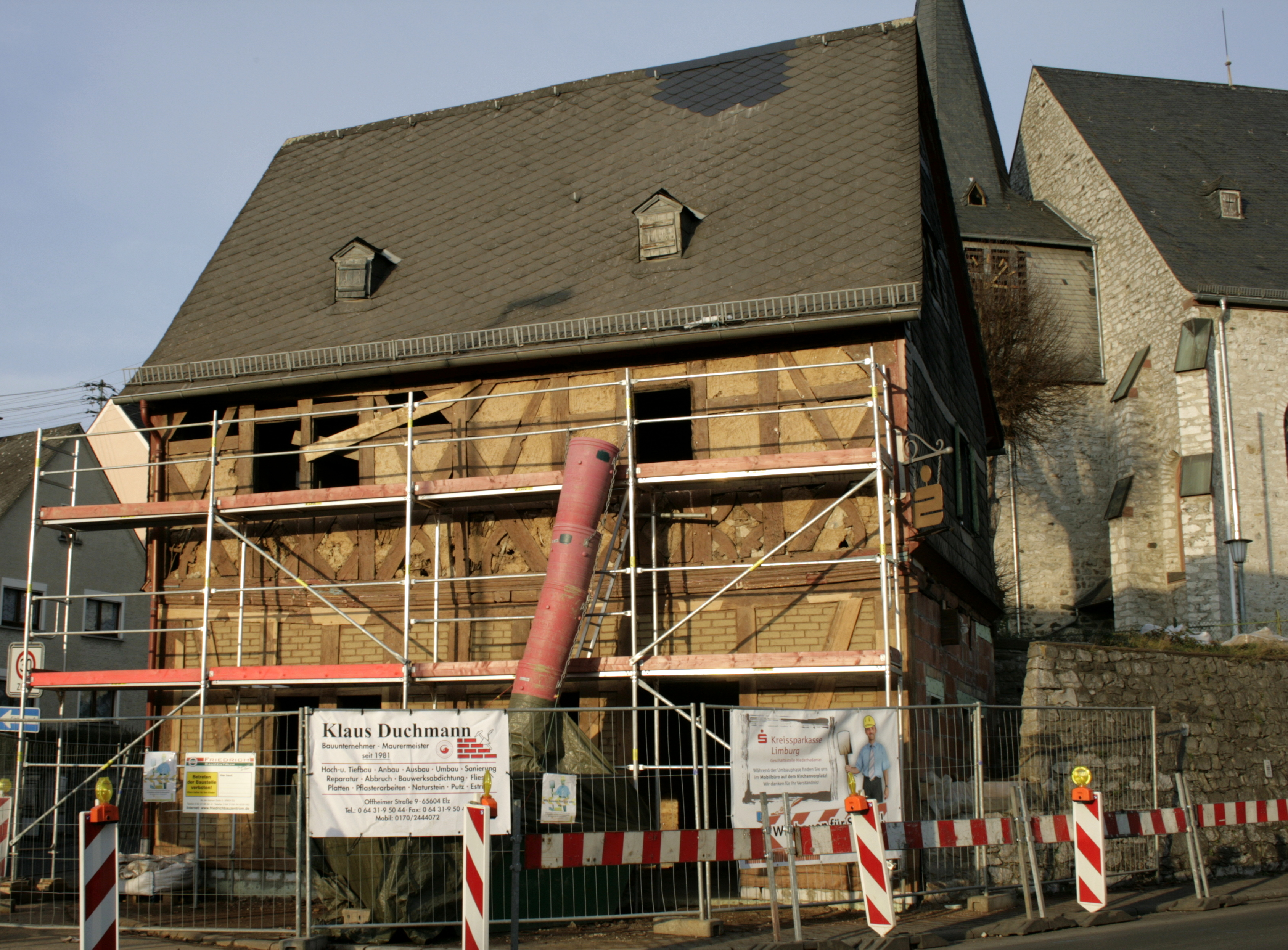 Ehemaliges Rathaus in Niederhadamar, Deutschland, während der Sanierung